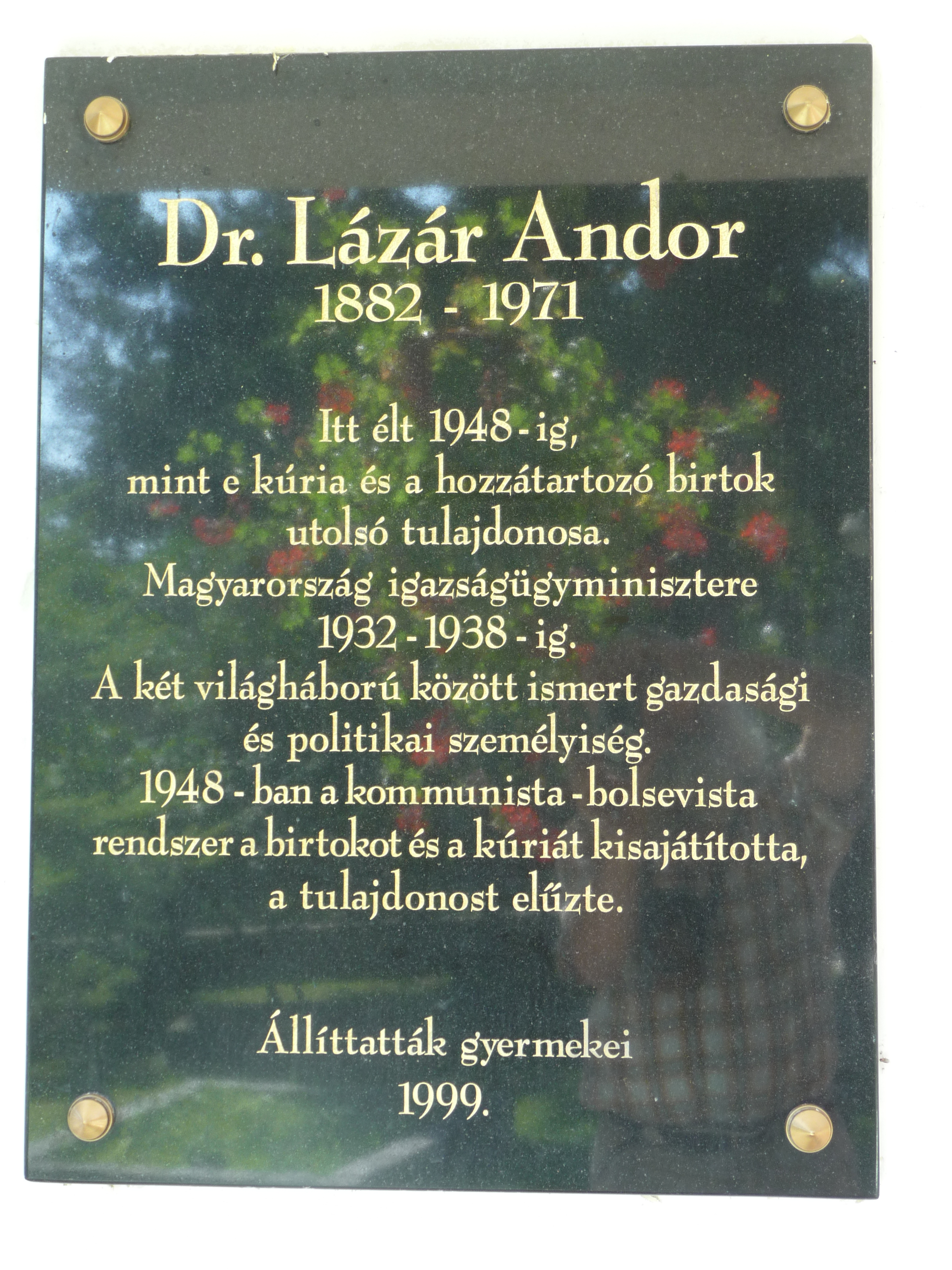 Lázár Andor emléktáblája